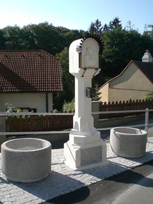 Kritzendorf, Unteres Mohswincklerkreuz. Hauptstraße 6. (Das denkmalgeschützte Mohswinklerkreuz auf Hauptstraße 125.)